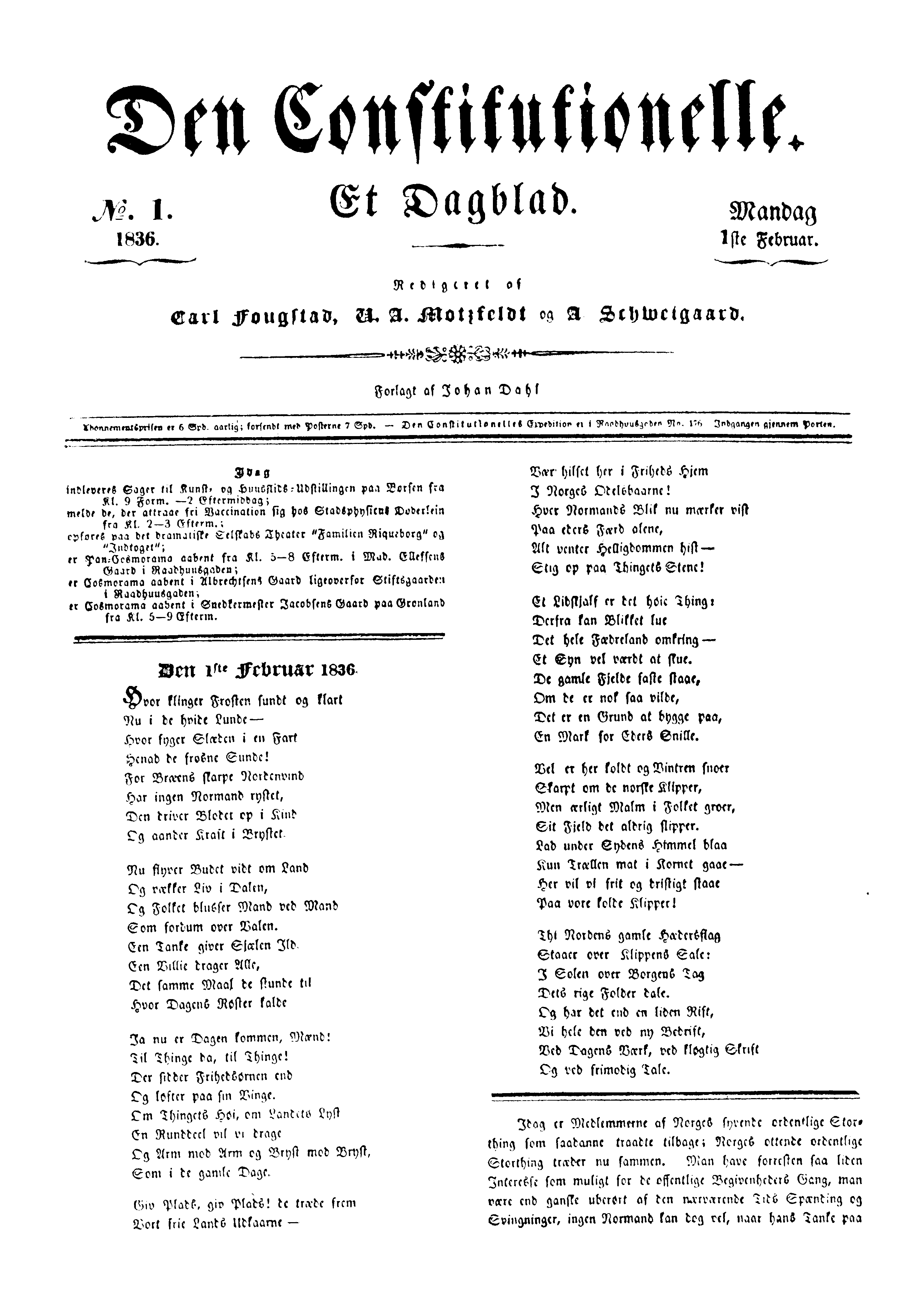 Første nummer av Den Constitutionelle, 1. februar 1836.